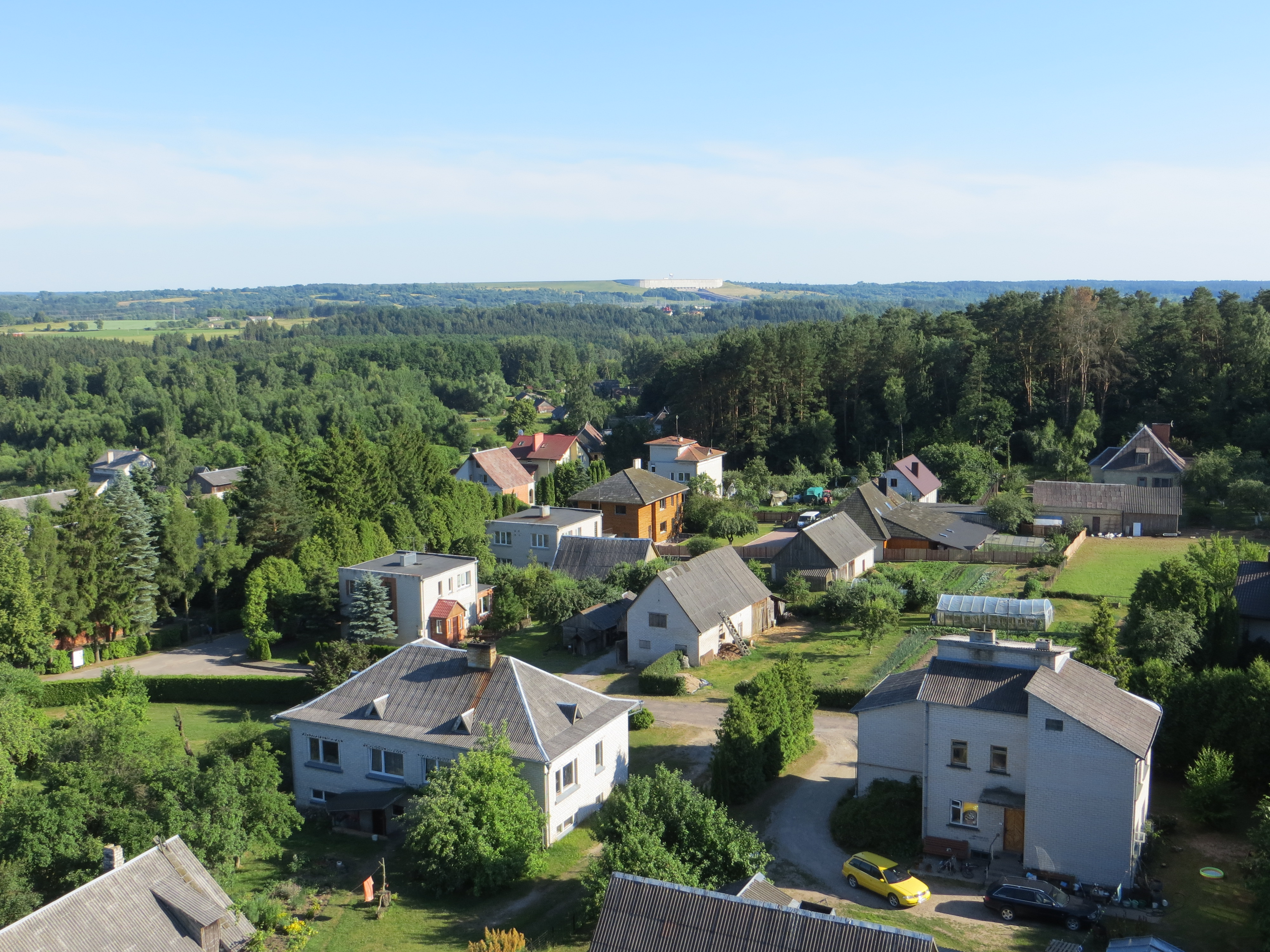 Dovainonys, Lithuania